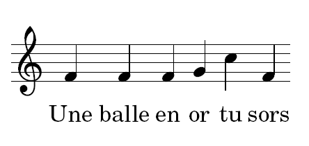 Partition de la formulette d'élimination Une balle en or tu sors. Réalisé avec LilyPond par Damien Boilley, 6 janvier 2006.